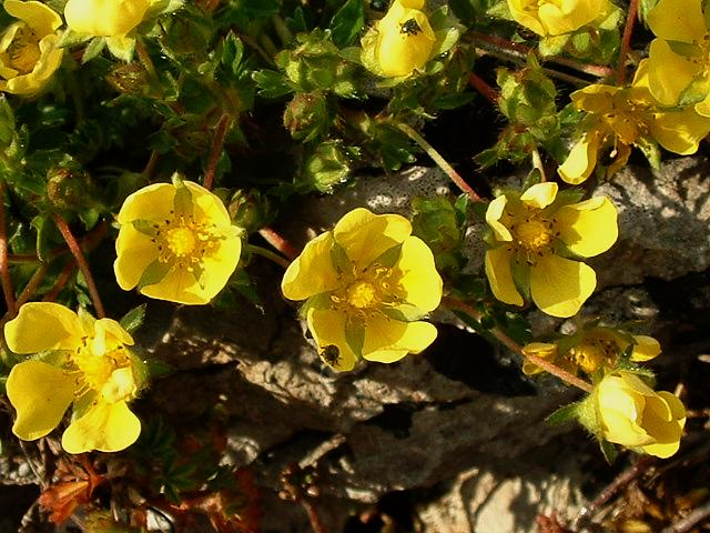 Potentille printanière